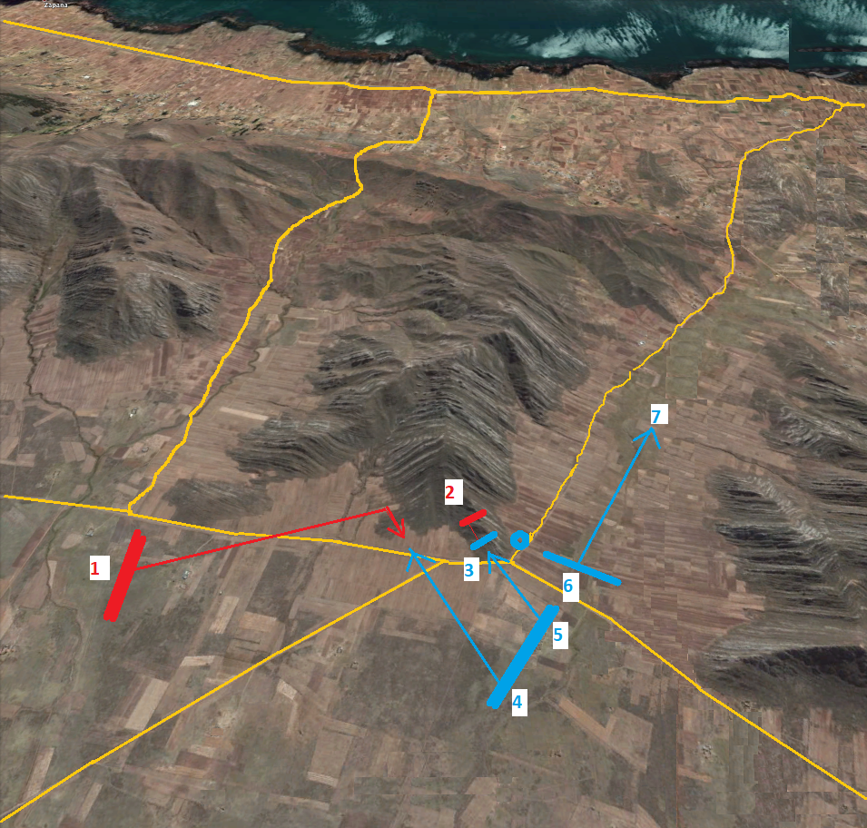 Batalla de Huaqui (20/6/1811). Zona sur de la quebrada de Yuraicoragua. Color rojo: Ejército Real del Perú. Color Azul: Ejército Auxiliar y Combinado del Perú. Situación 10:00 horas: 1 y 2) Ataque de Ramírez y su vanguardia; 3-5) Araoz sostiene su posición y recibe ayuda de Viamonte; 4) Díaz Vélez ataca a Ramírez; 6-7) Balbastro adelanta 4 compañías